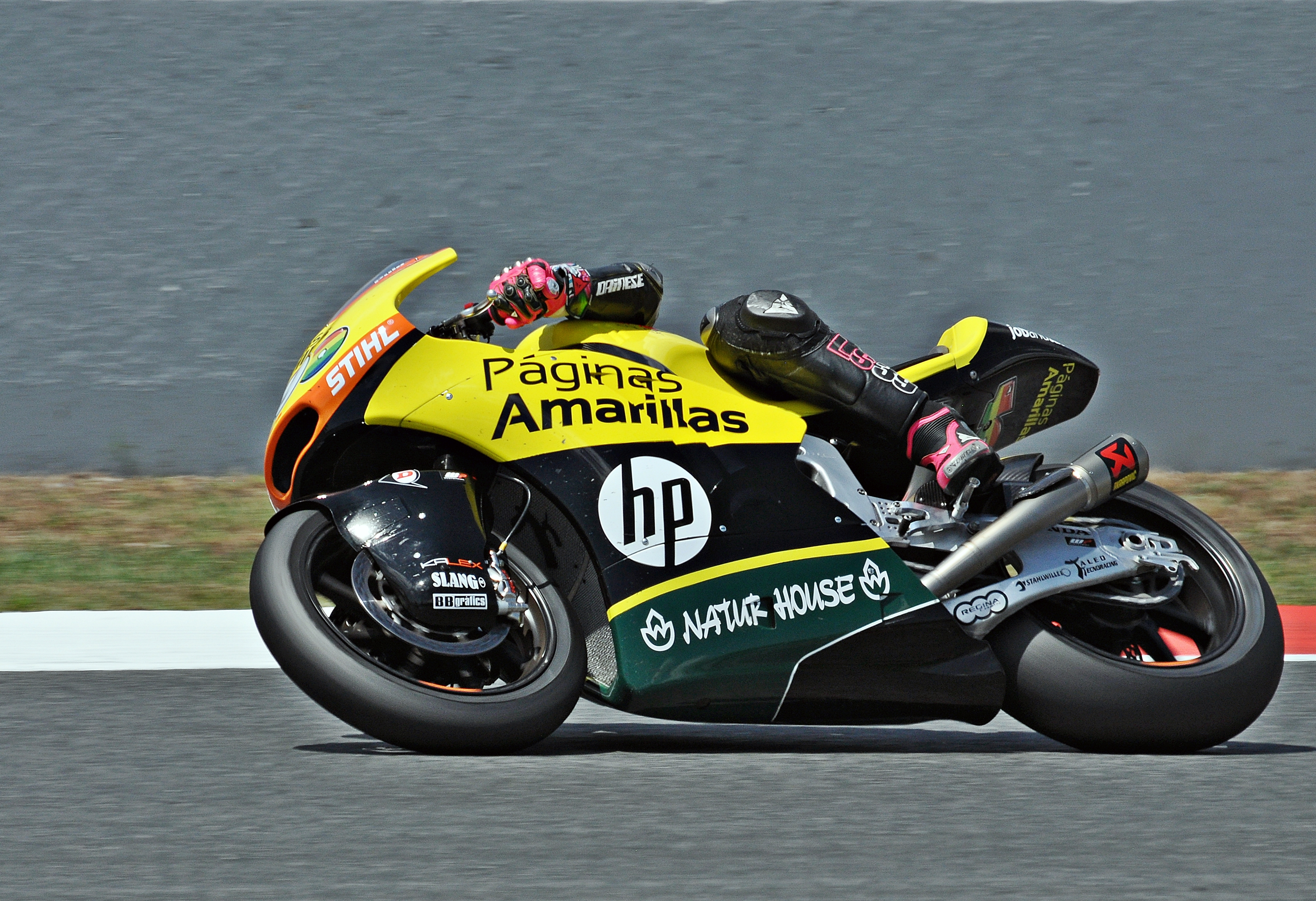 gran premio de cataluña